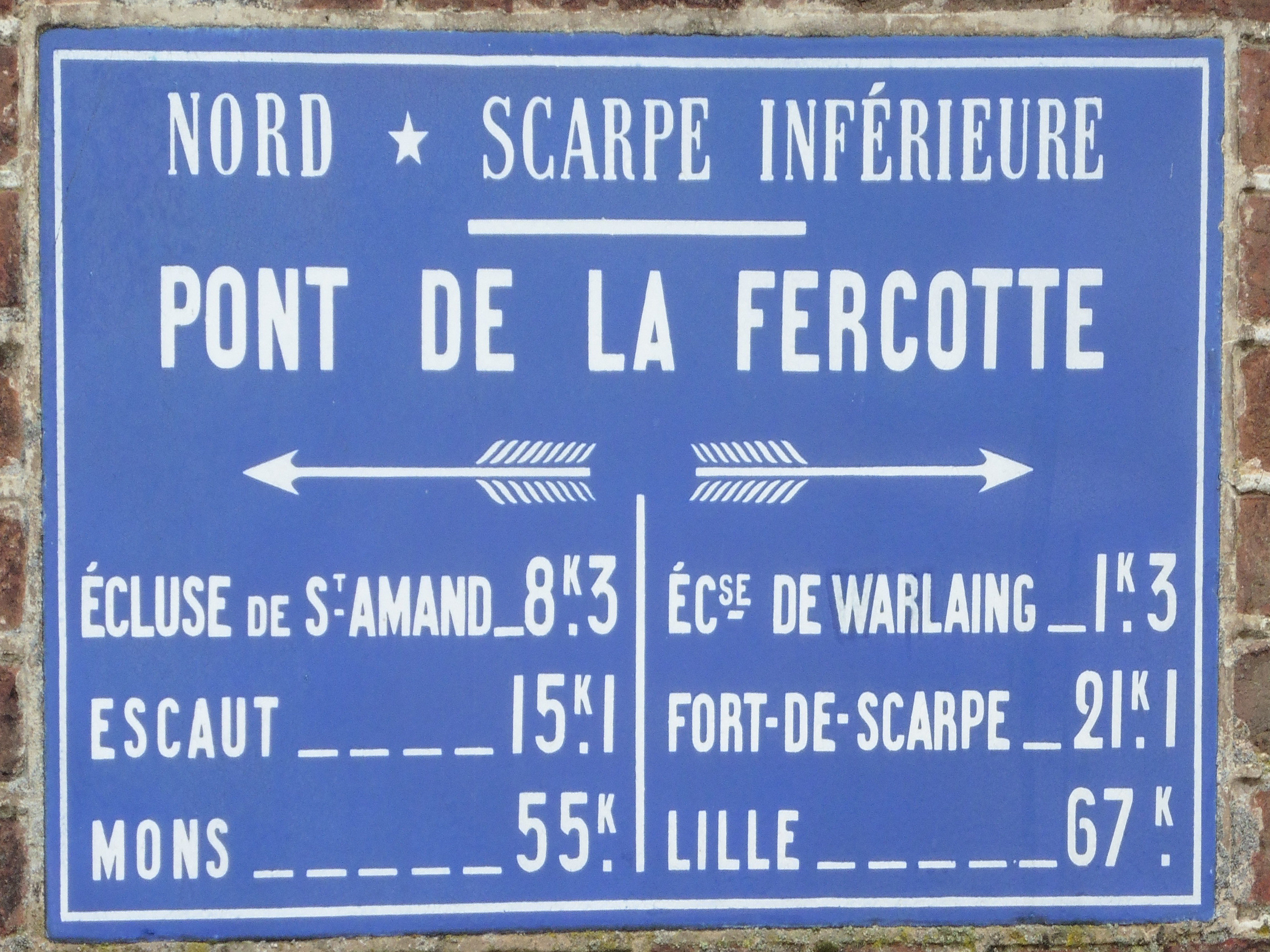 Hasnon-la-Cataine Plaque du Pont de la Fercotte